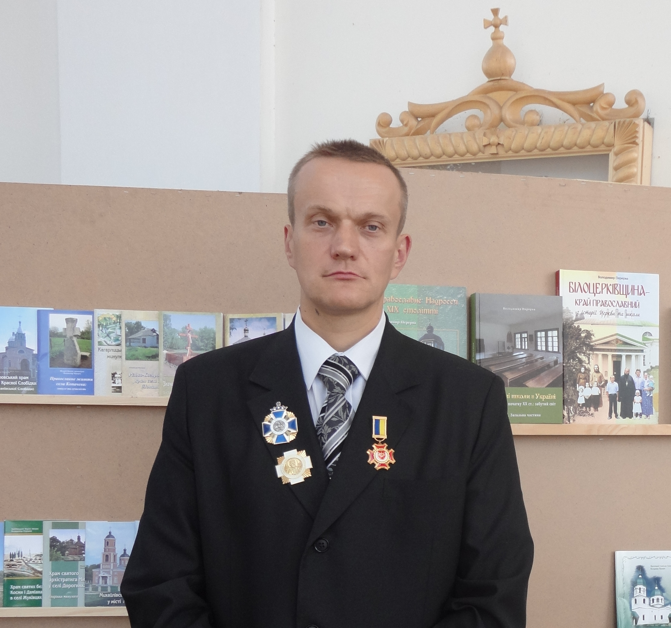 Володи́мир Степа́нович Пере́рва — український краєзнавець, кандидат історичних наук, доцент